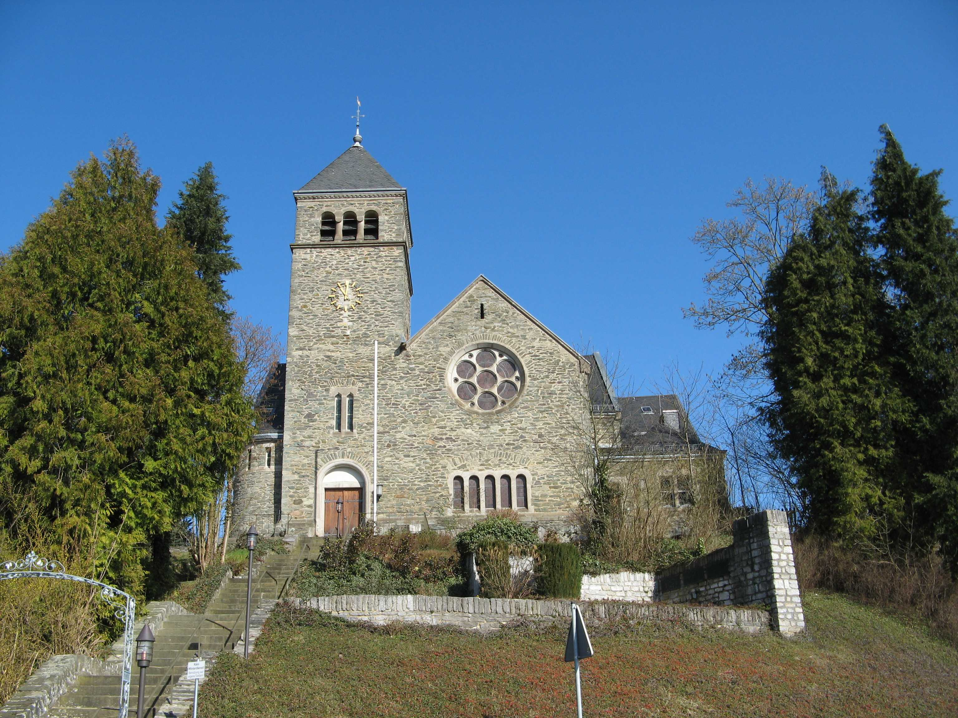 Evangelische Kirche in Heckholzausen, Hessen, Deutschland